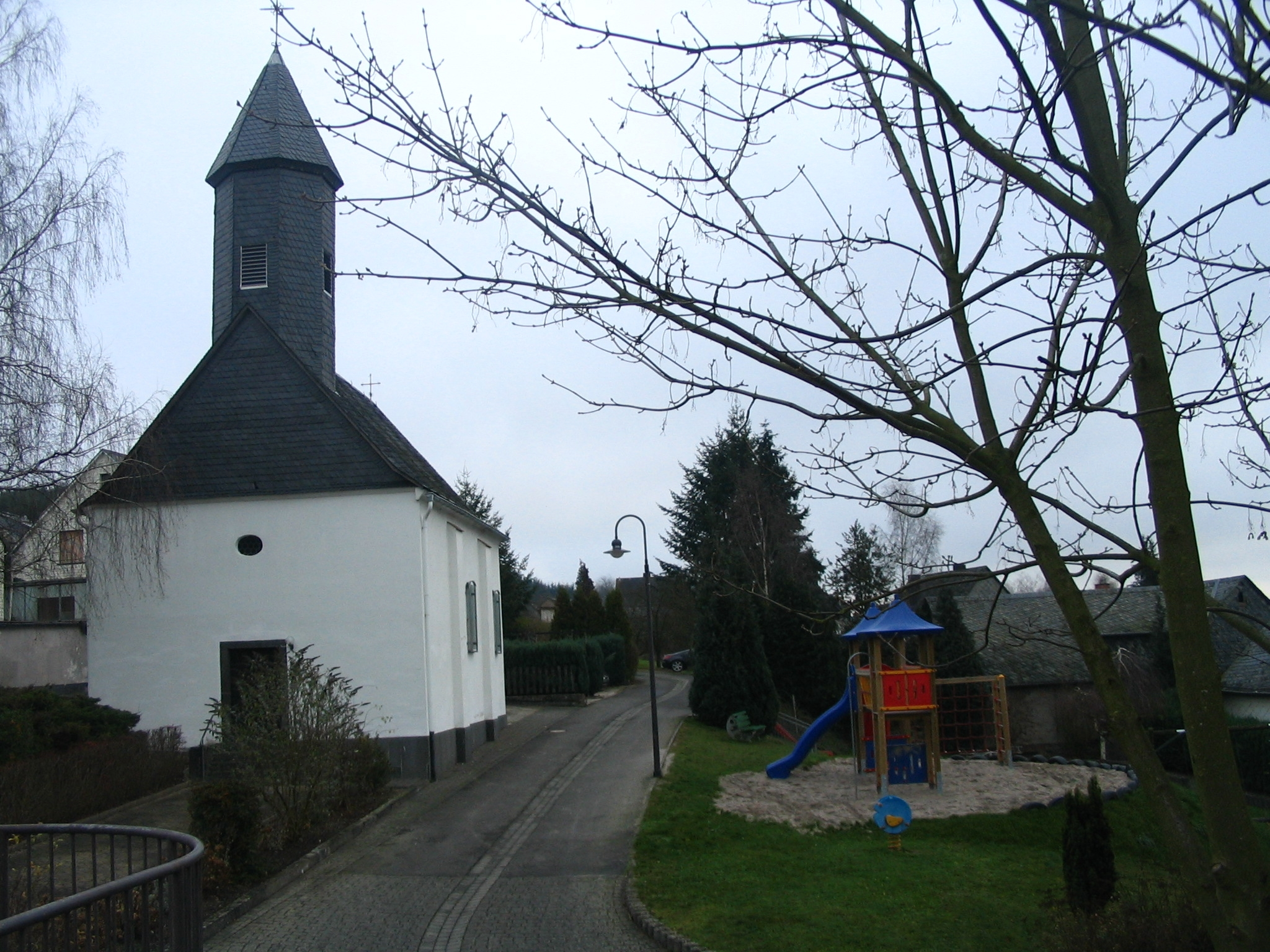 Kapelle in Schauren bei Blankenrath im Hunsrück